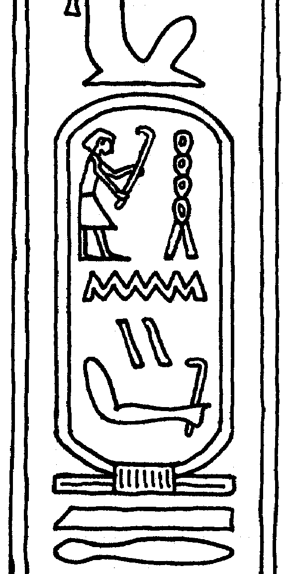 Kartusche des Huni in der Königsliste von Saqqara